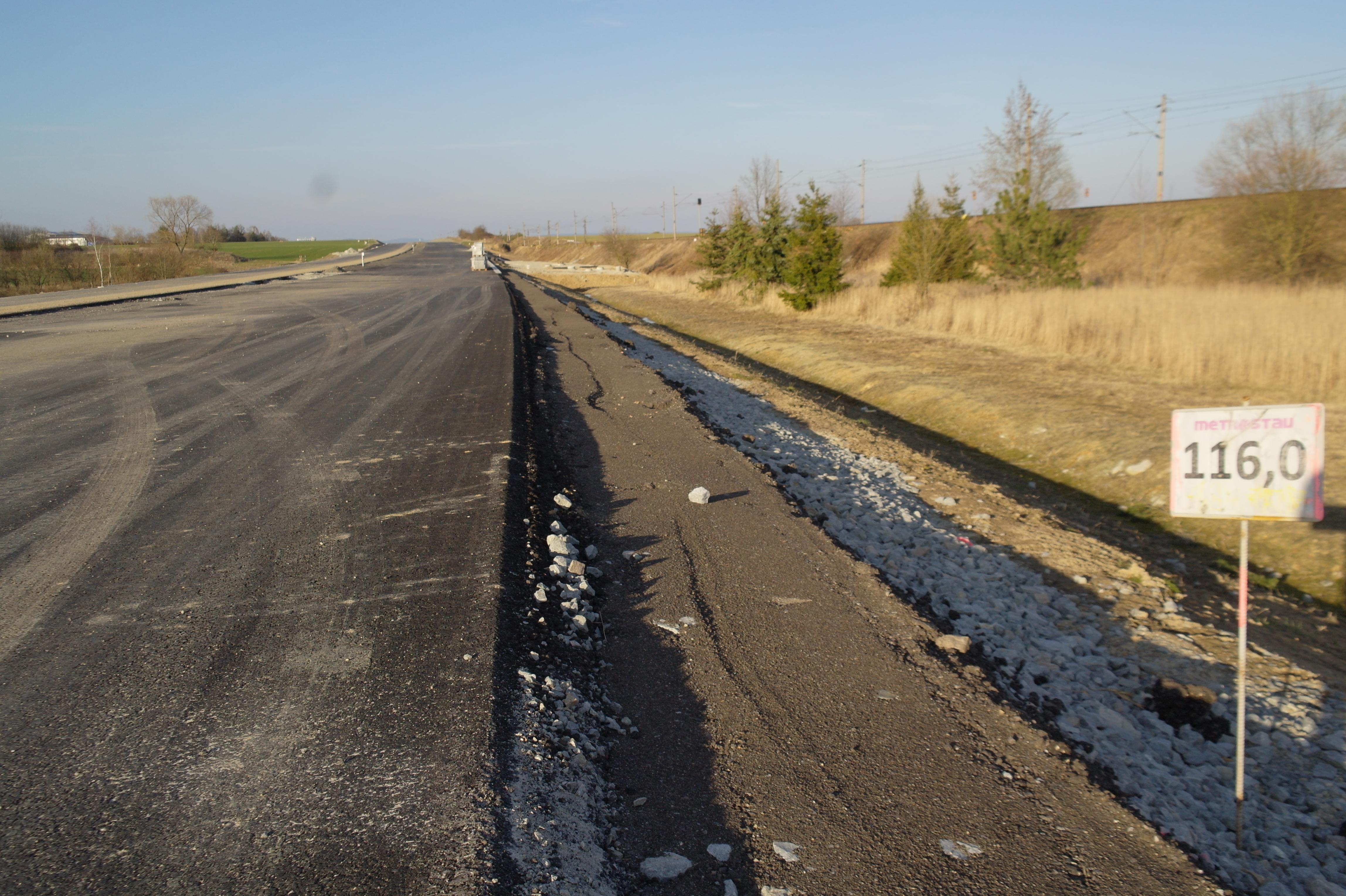 Ševětín, stavba dálnice D3, pohled na sever